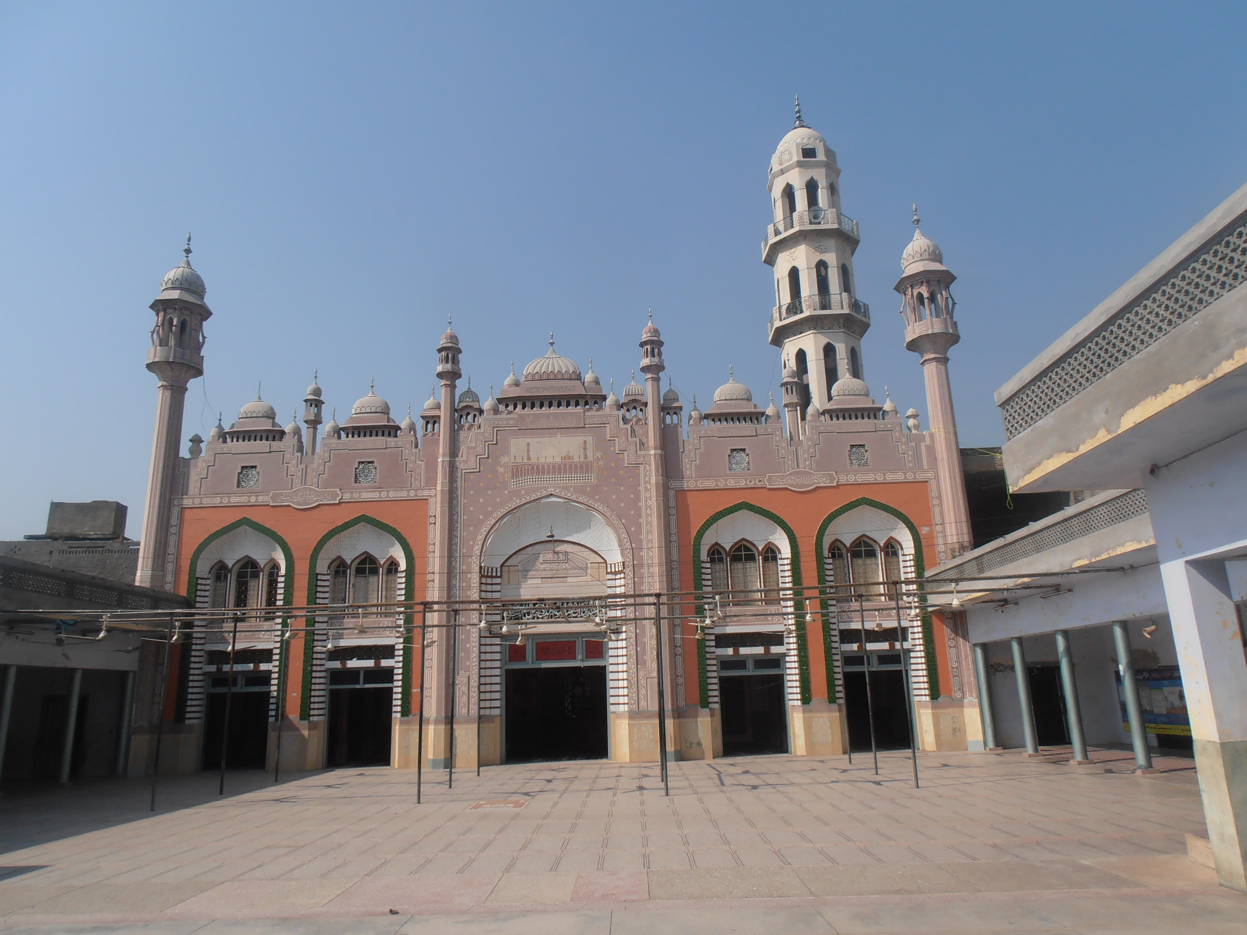 Narowal, Pakistan